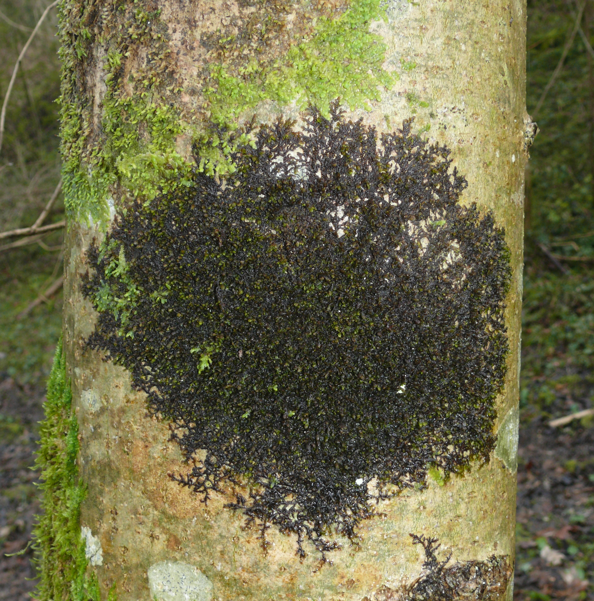 Frullania dilatata, Hohenlohe, Germany